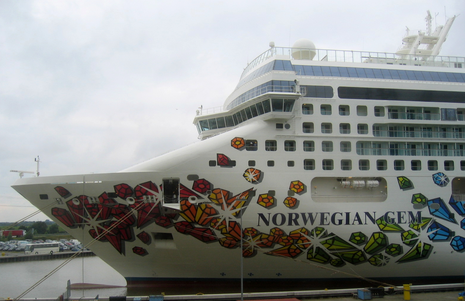 Bug der „Norwegian Gem“ am Ausrüstungskai (Industriehafen) der Meyer-Werft in Papenburg.